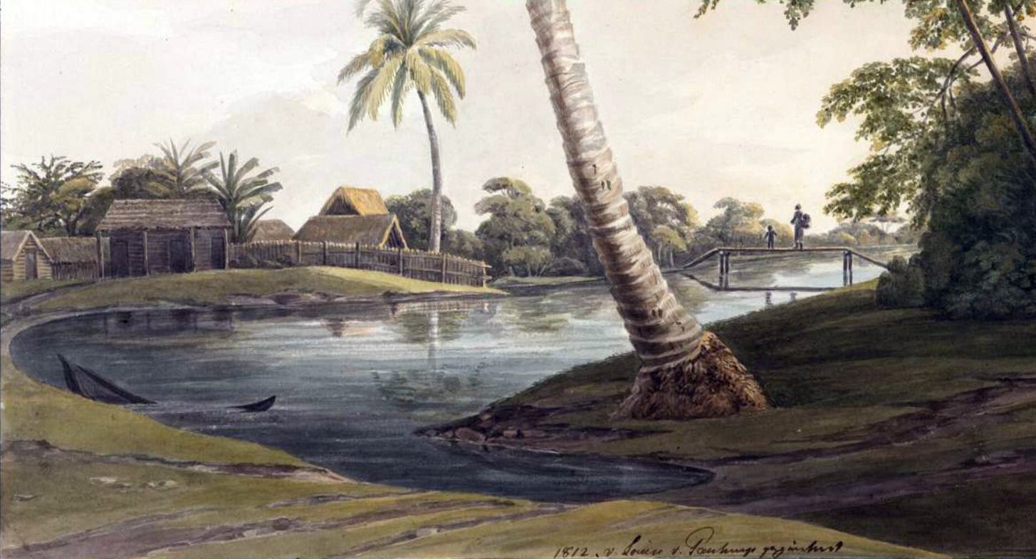 Detail van een aquarel van een landschap met slavenhutten van de plantage Nijd en Spijt, geschilderd in 1812 door Louise van Panhuys tijdens haar verblijf in Suriname als echtgenote van een plantagehouder (1811-1816). Collectie Universiteitsbibliotheek Frankfurt am Main.